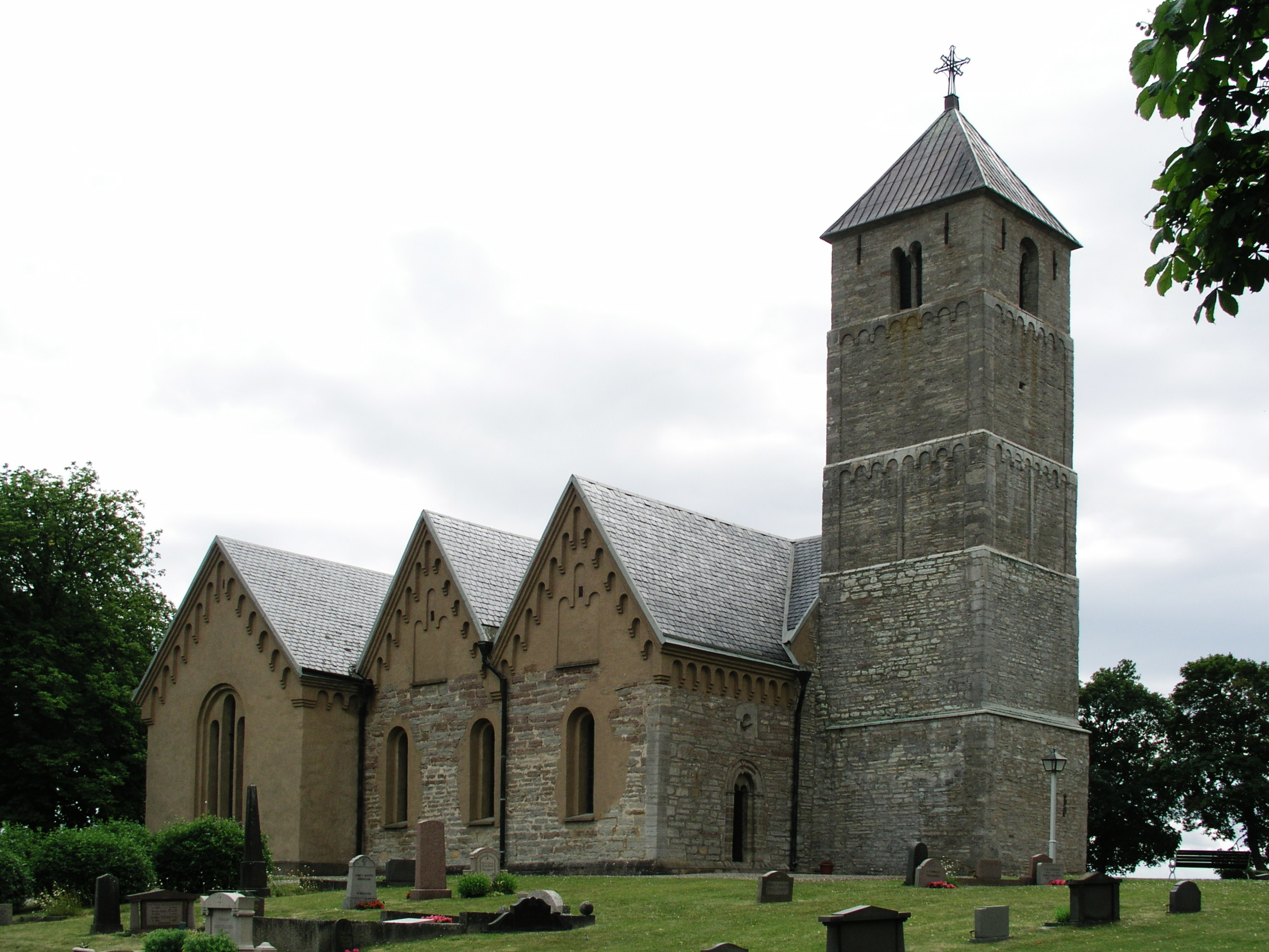 Heda kyrka, Diocese of Linköping, Ödeshögs kommun.